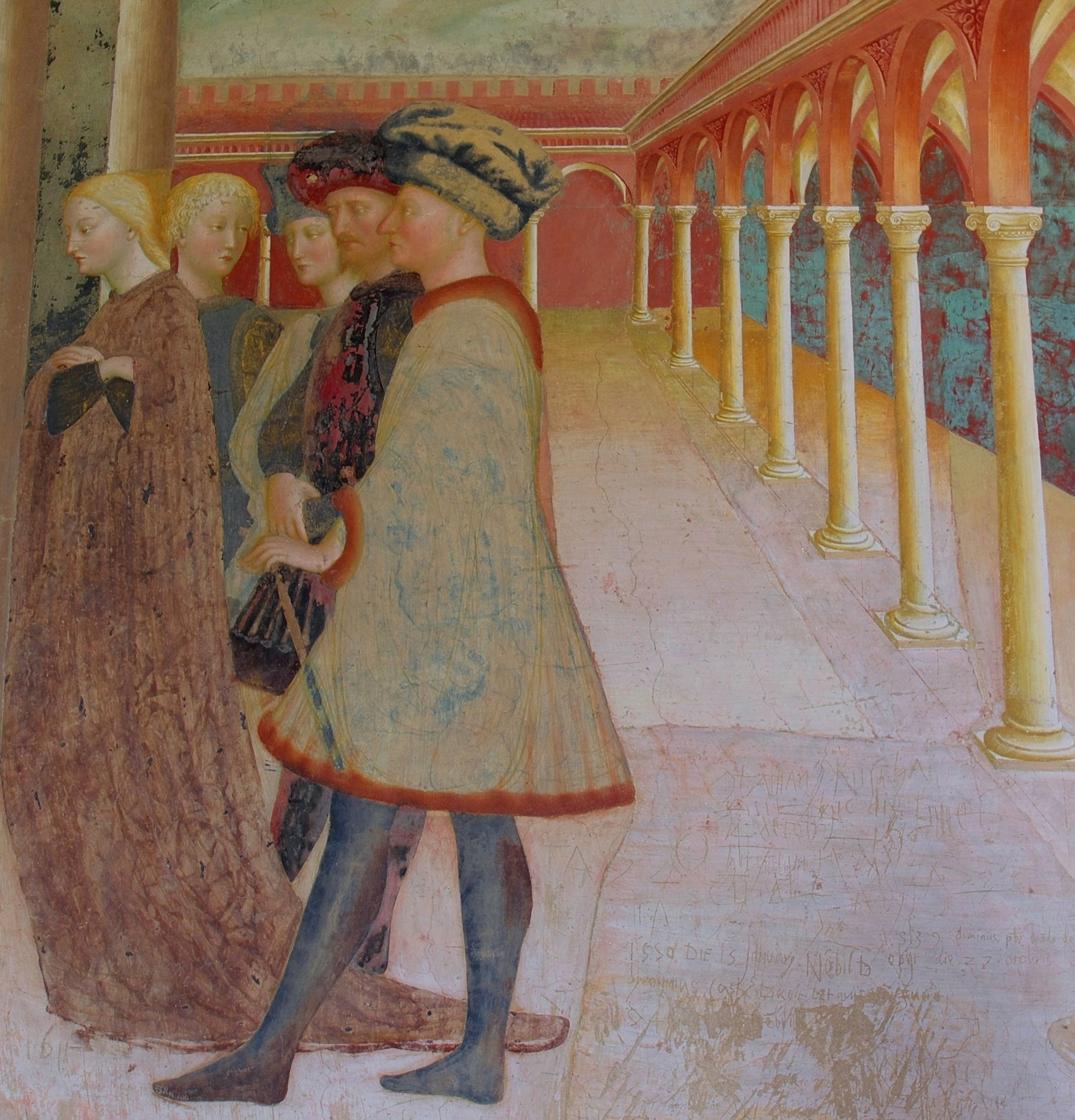 Salomè e astanti Banchetto Erode Battistero Castiglione Olona